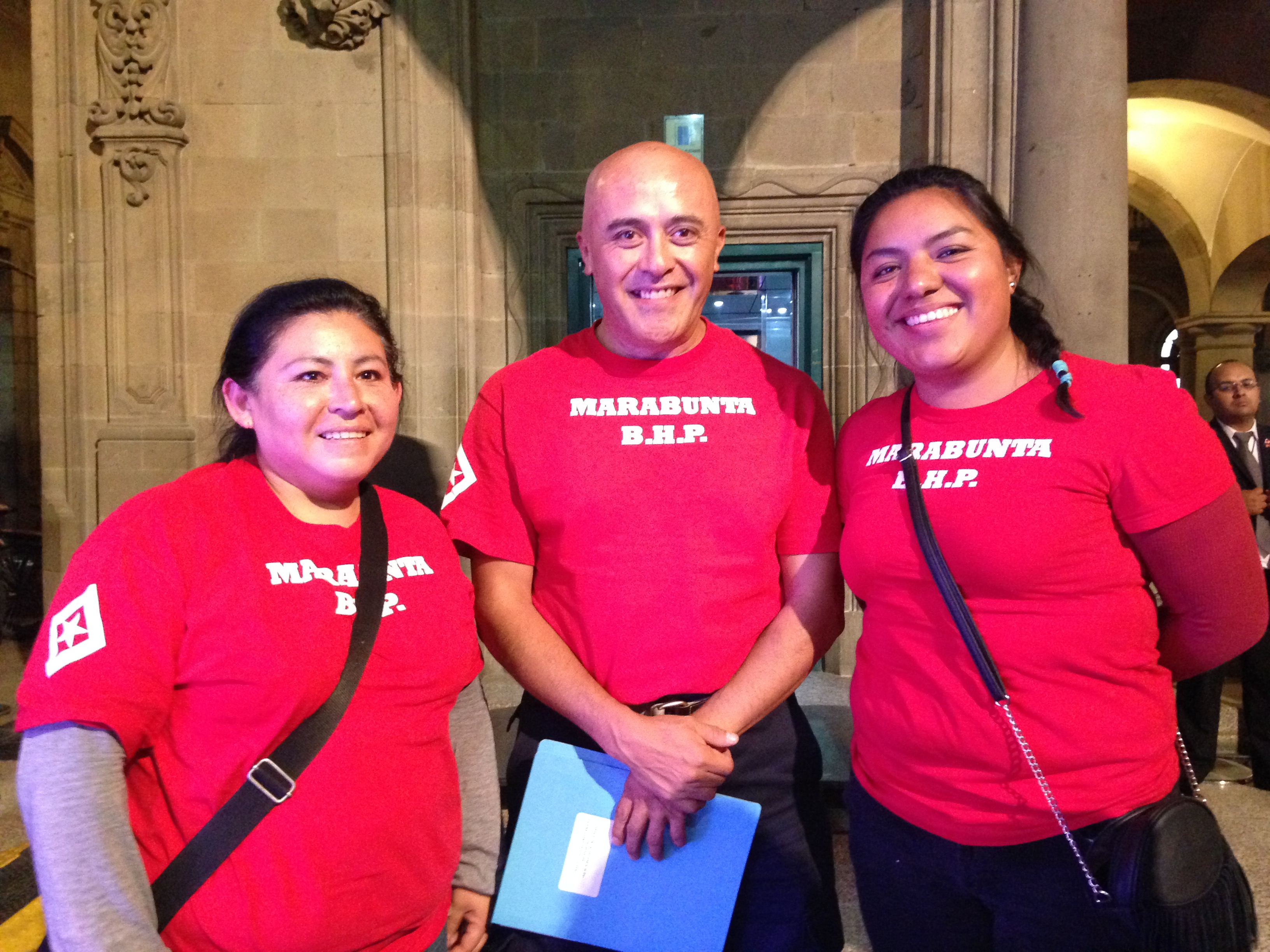 Integrantes de la Brigada Marabunta